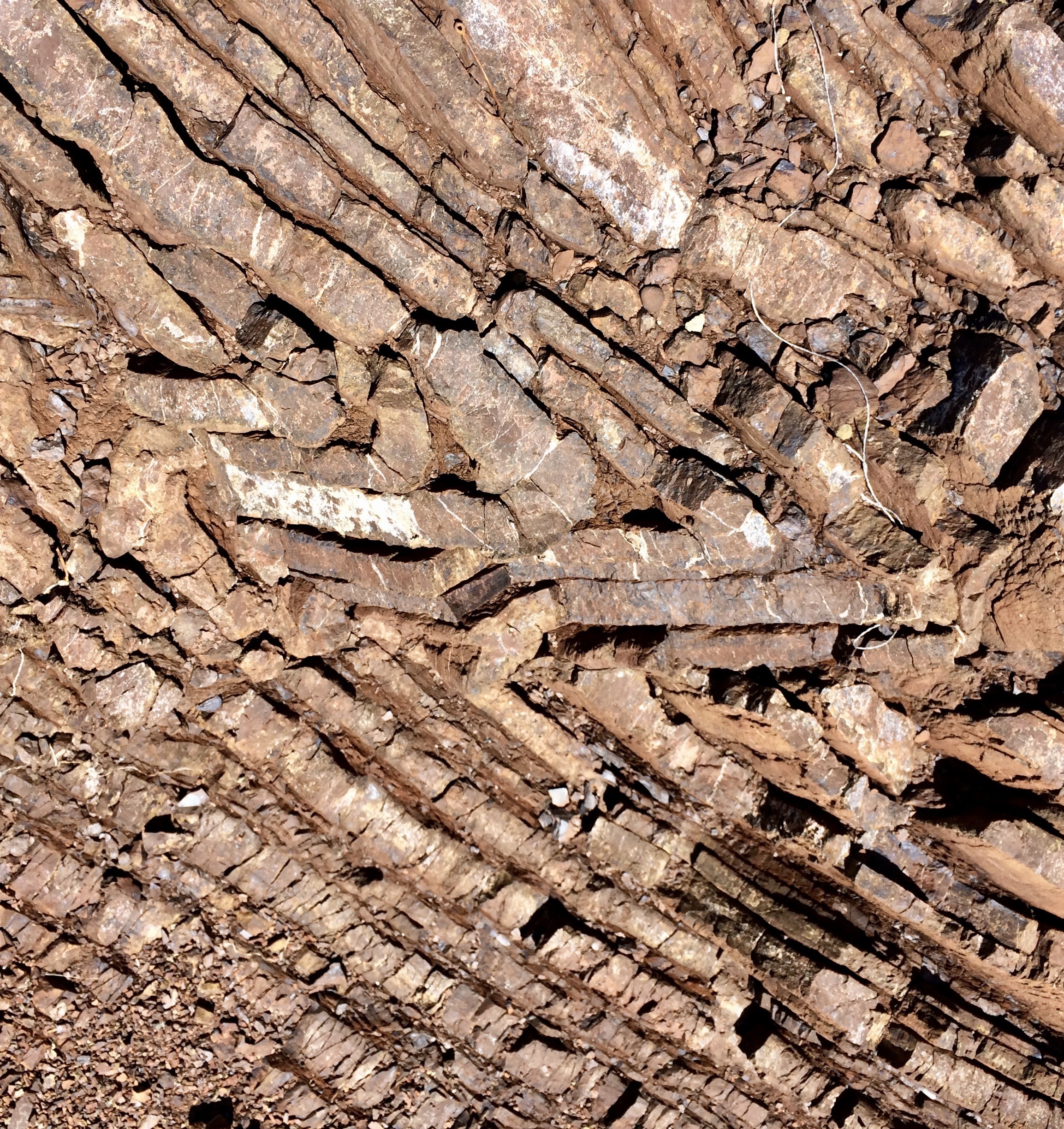 Estero Bluffs state park, near Cayucos CA